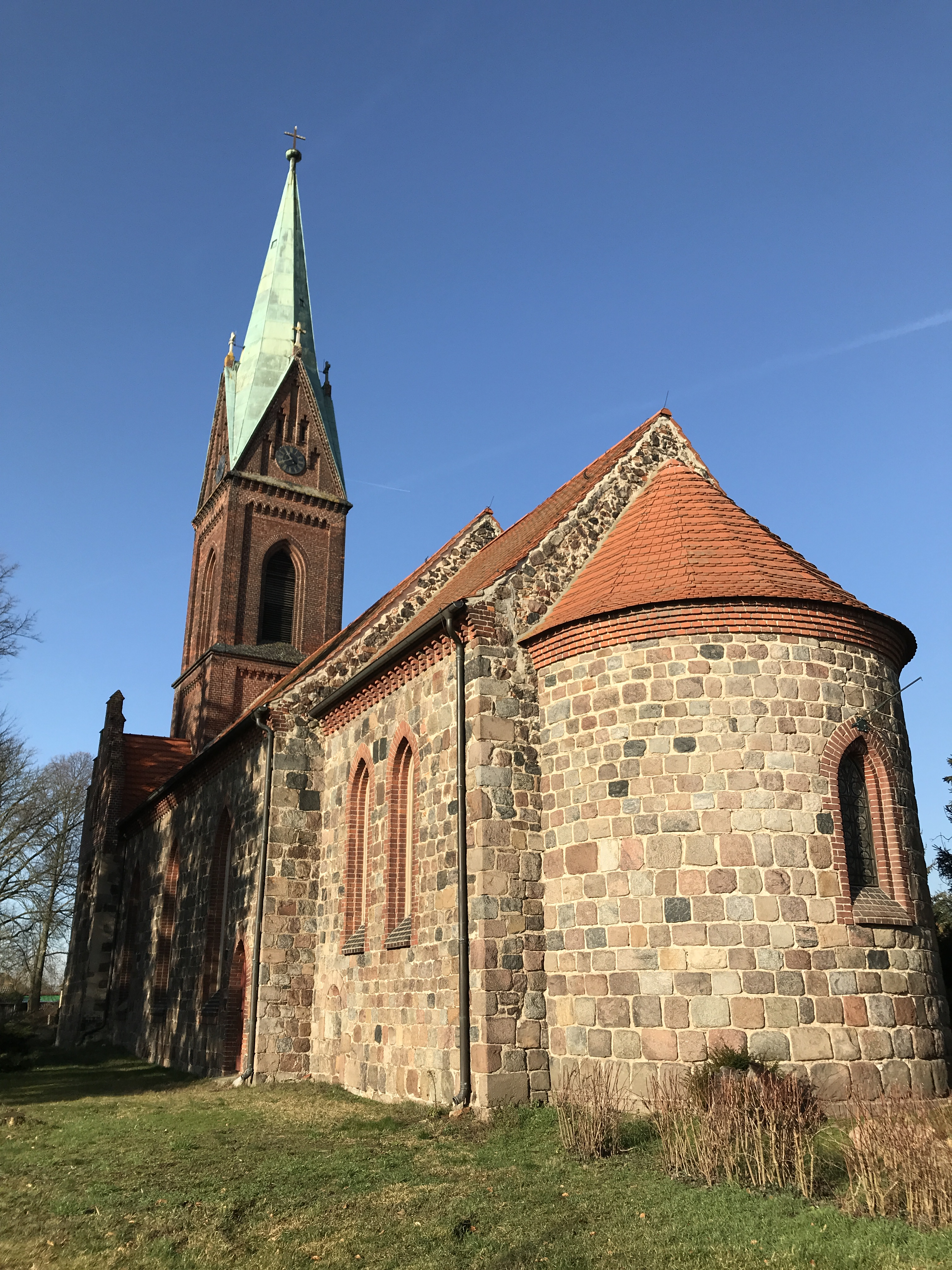 Die Dorfkirche Wahlsdorf ist eine spätromanische Feldsteinkirche aus der ersten Hälfte des 13. Jahrhunderts in Wahlsdorf, einem Ortsteil von Dahme/Mark in Brandenburg. Die Kirchenausstattung ist neugotisch.